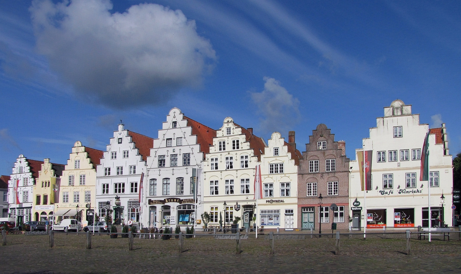 vollständiges Ensemble mit allen 9 Treppengiebel-Häusern Am Markt Westseite (teilweise sind es Kulturdenkmale) Friedrichstadt Nordfriesland Schleswig-Holstein - Foto 2012 Wolfgang Pehlemann (weiter bearbeitete Version unter "Ensemble alle 9 Treppengiebel-Häuser Am Markt Westseite Friedrichstadt Foto 2012 Wolfgang Pehlemann IMG_2717.jpg"